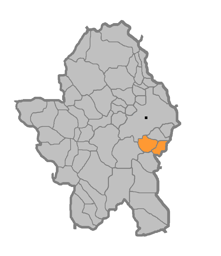 МЗ Карановац (БЛ)